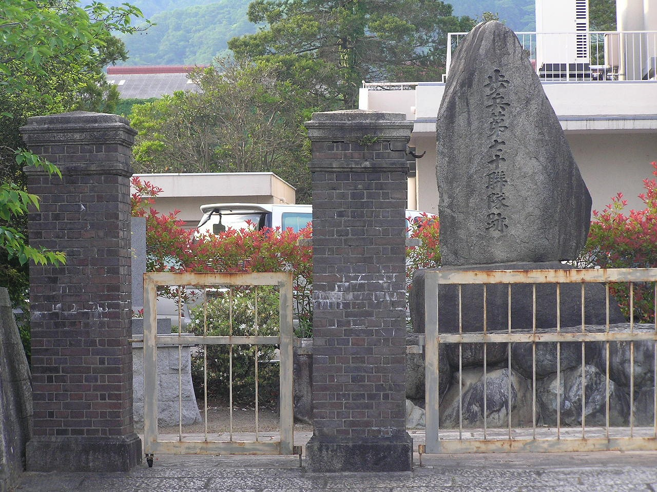 日本陸軍・歩兵第70連隊跡